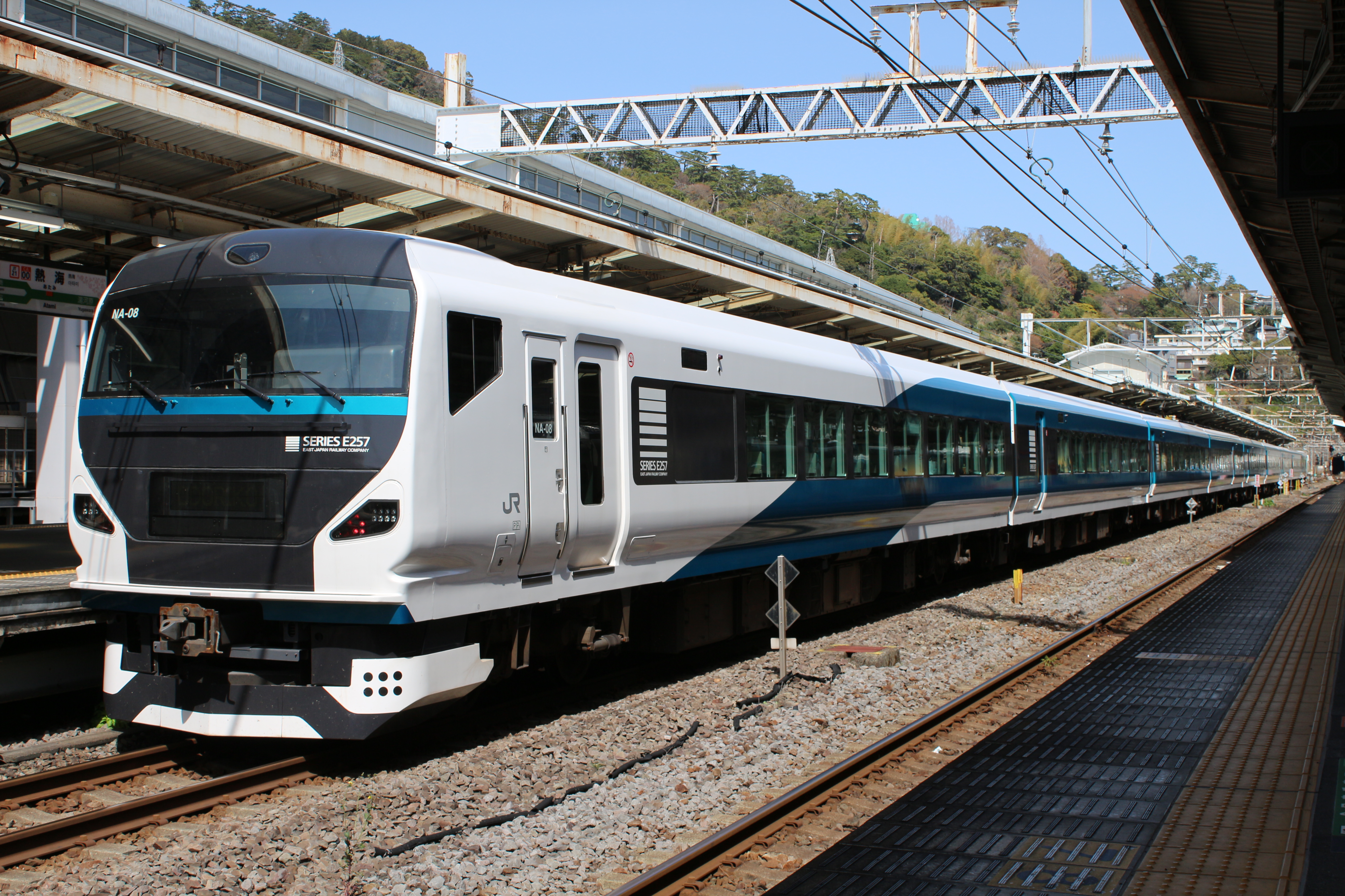 E257系 踊り子 熱海駅